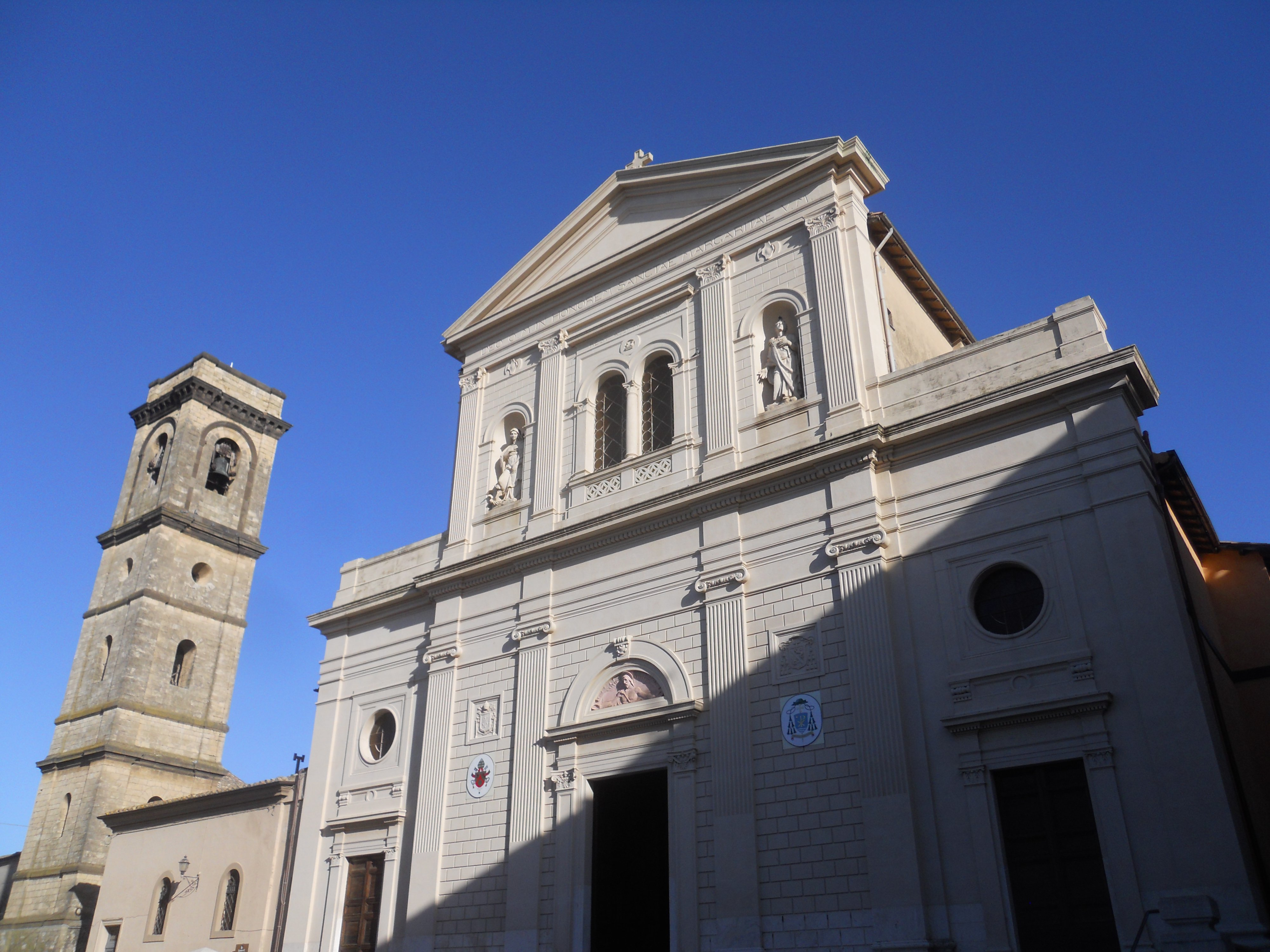 Facciata e campanile della concattedrale dei Santi Margherita e Martino a Tarquinia.